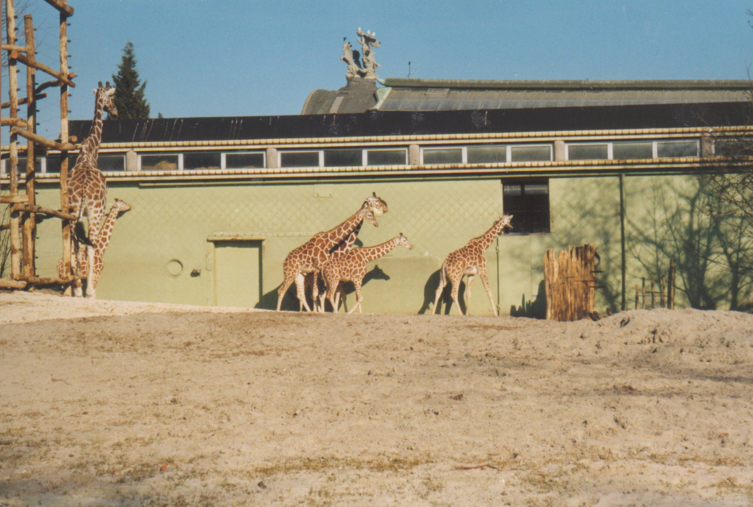 Girraffa Diergaarde Blijdorp